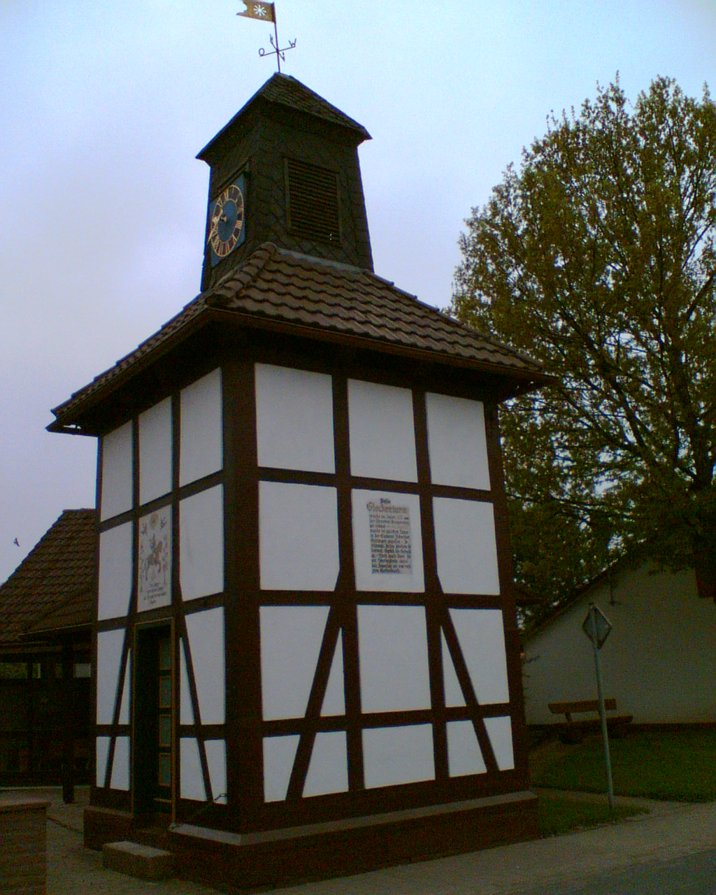 Glockenturm Rengershausen